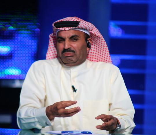 Tareq Al-Ali